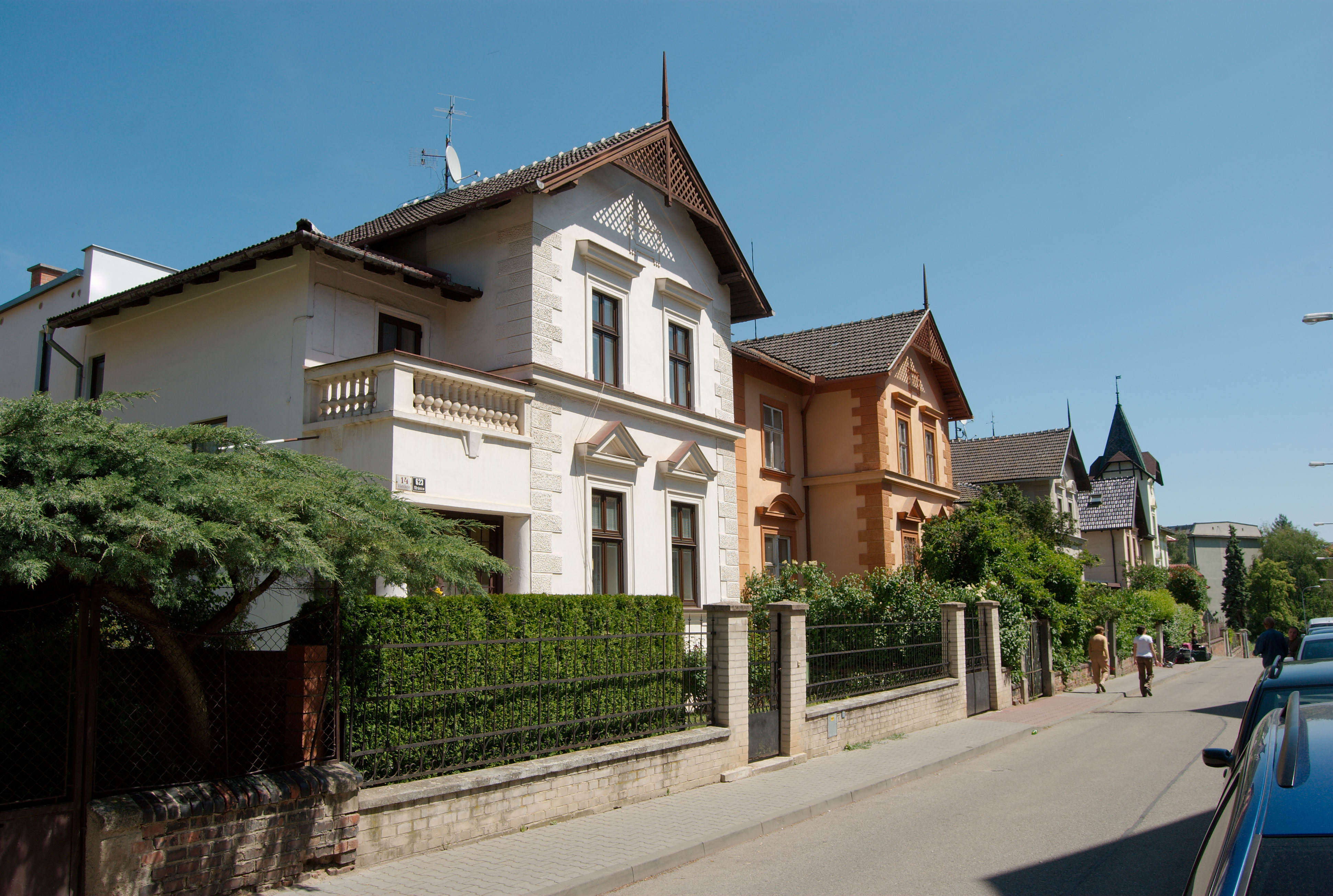 Brno-Masarykova čtvrť - původní německé domy na severní straně Všetičkovy ulice (pohled k východu)